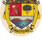 Escudo del municipio Páez. Estado Miranda. Venezuela